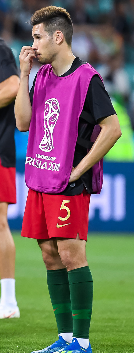 Хет-трик Роналду приносит Португалии ничью в пиренейском дерби